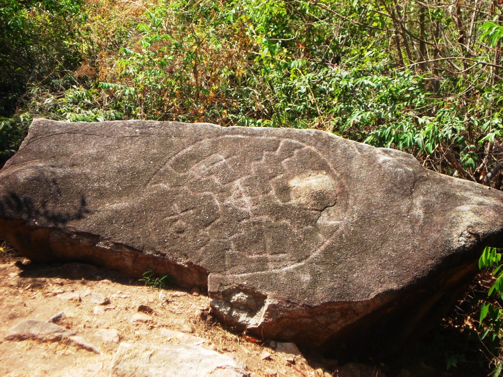 Elemento Nº 10 de la zona arqueológica de Palma Sola en Acapulco, Guerrero, México.